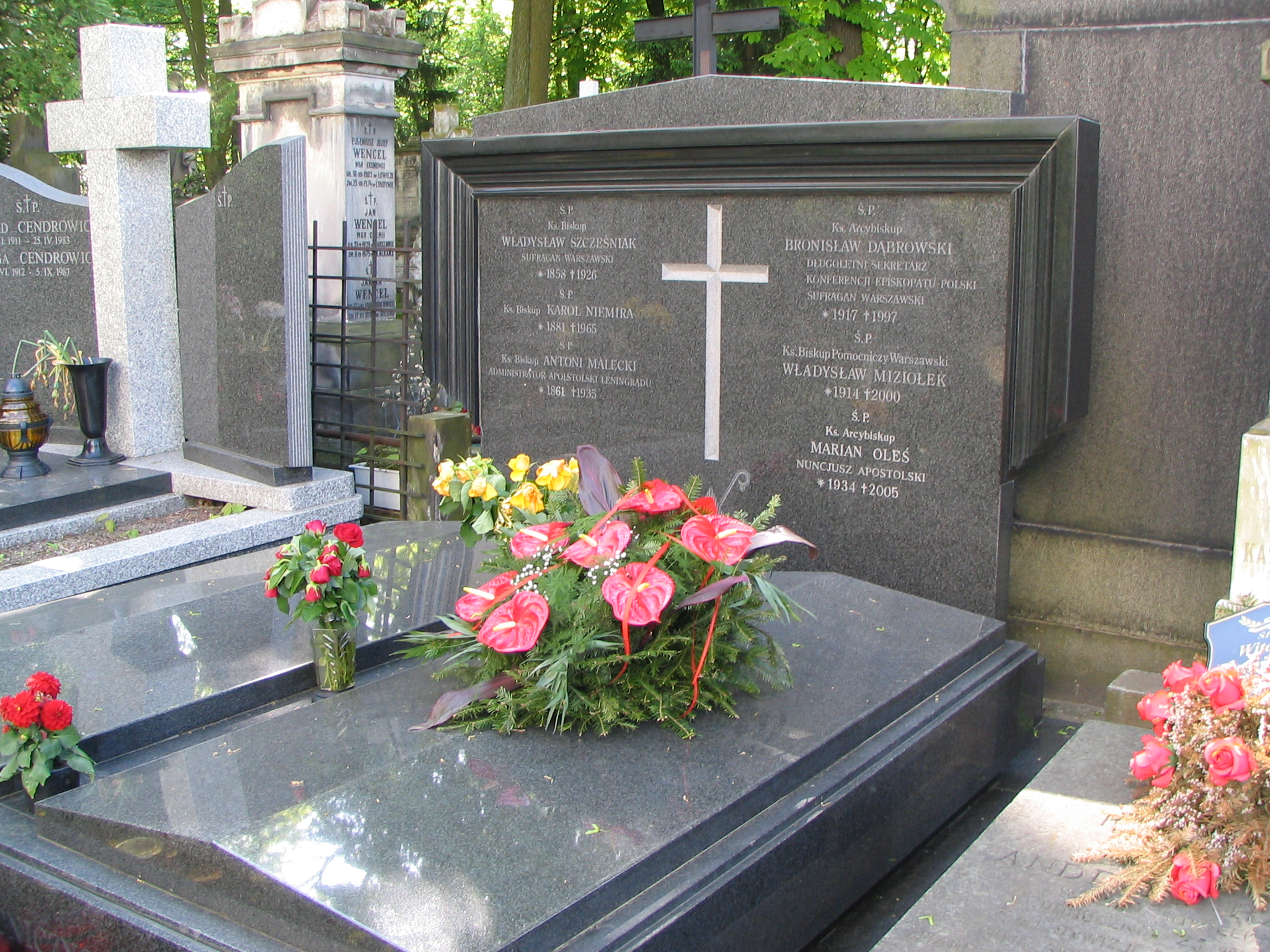 Grób biskupów warszawskich: bpa Władysława Szcześniaka, bpa Karola Niemiry, bpa Władysława Miziołka, abpa Bronisława Dąbrowskiego oraz administratora apostolskiego Leningradu bpa Antoniego Maleckiego i nuncjusza apostolskiego abpa Mariana Olesia, Cmentarz Powązkowski w Warszawie, 14 maja 2008.